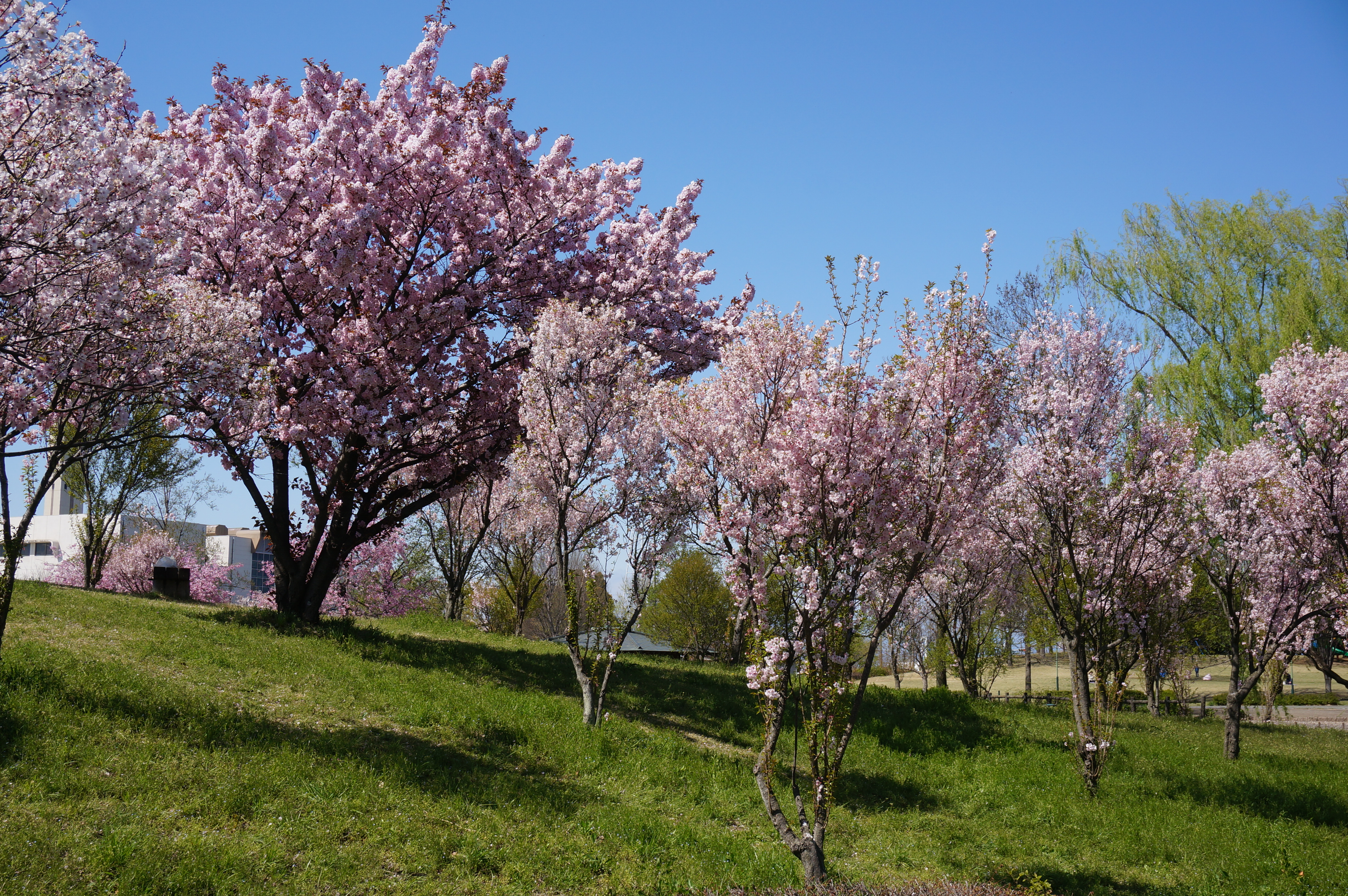 埼玉県熊谷市別府沼公園のクマガイとケンロクエンクマガイ